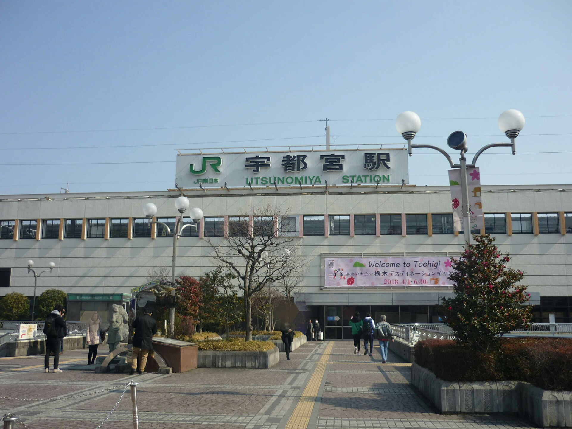 宇都宮駅西口